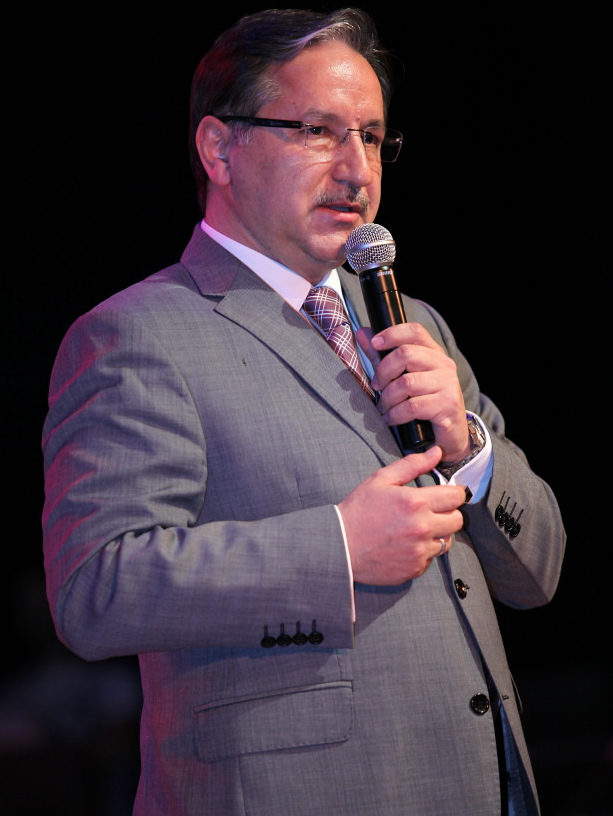 Mustafa Karataş